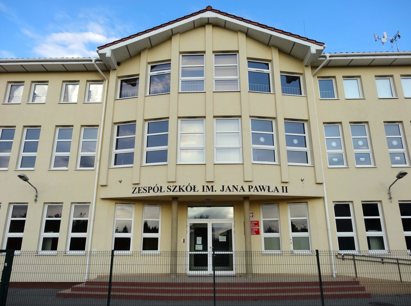 Zespół szkół im. Jana Pawła II w Łochowie, gmina Białe Błota, powiat bydgoski